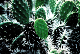 Nopal mexicano